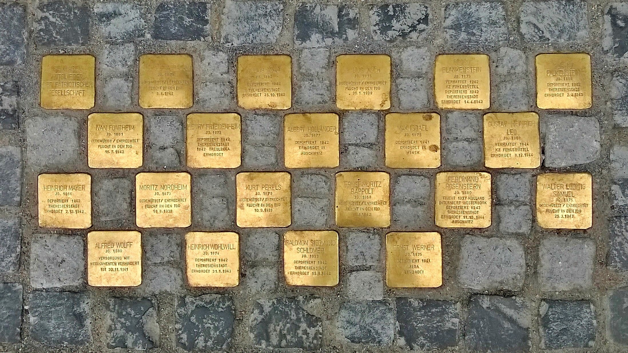 Stolpersteine vor dem Haus der Patriotischen Gesellschaft in Hamburg, Trostbrücke, Hamburg-Altstadt